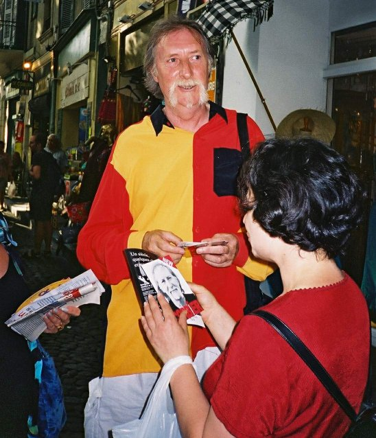 Francois Corbier au Festival d'Avignon 2002, dans la rue pour la promotion de son album